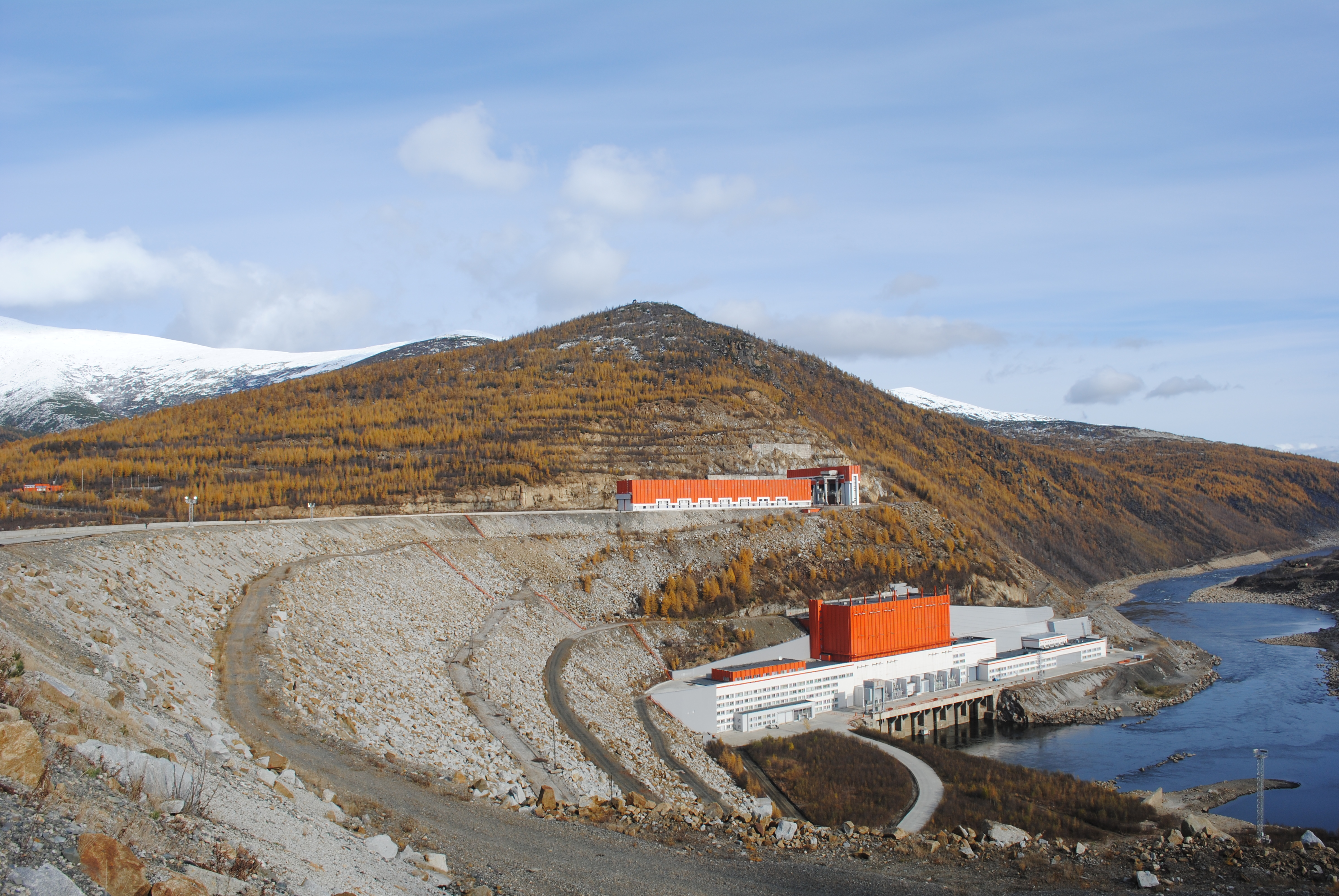 Колымская ГЭС